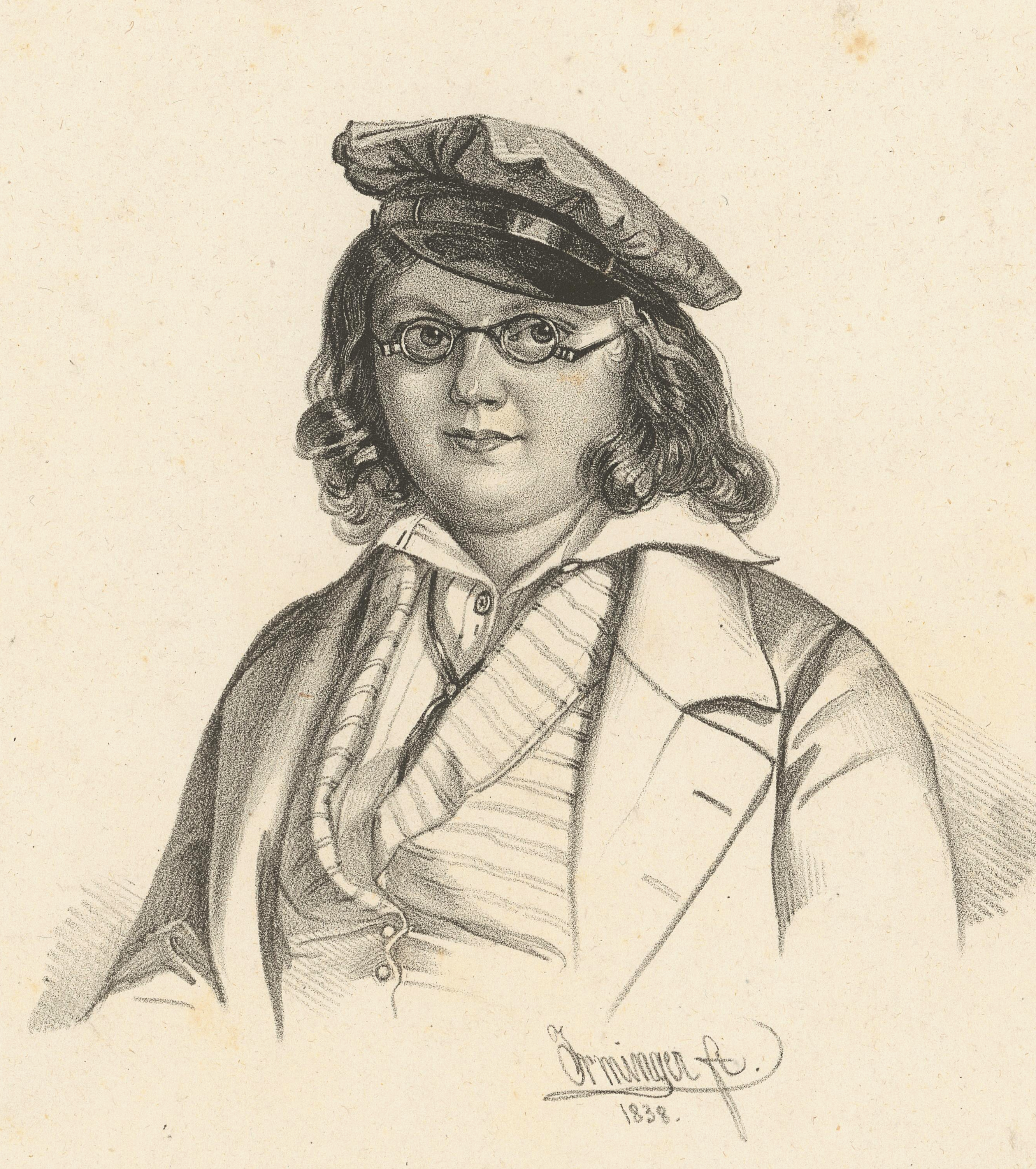 zugeschnittenes Porträt des Schweizer Astronoms Kaspar Gottfried Schweizer